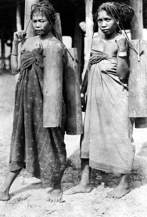 Repronegatief. Twee waterdraagsters uit West-Flores